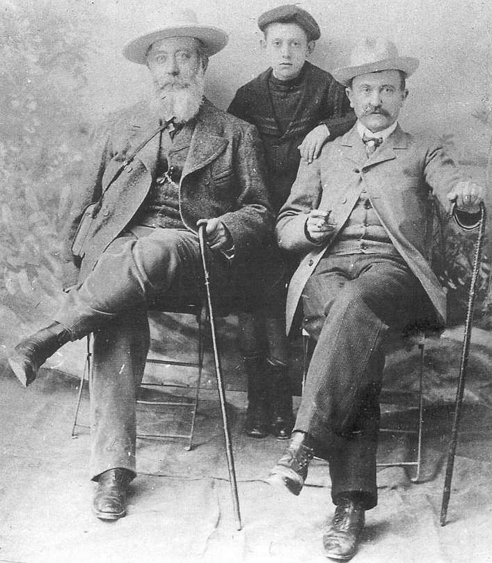 El arqueólogo Pierre Paris junto a Engel de Osuna. Detrás de ambos hay un joven, que se duda si es el hijo o el sobrino de alguno de ellos